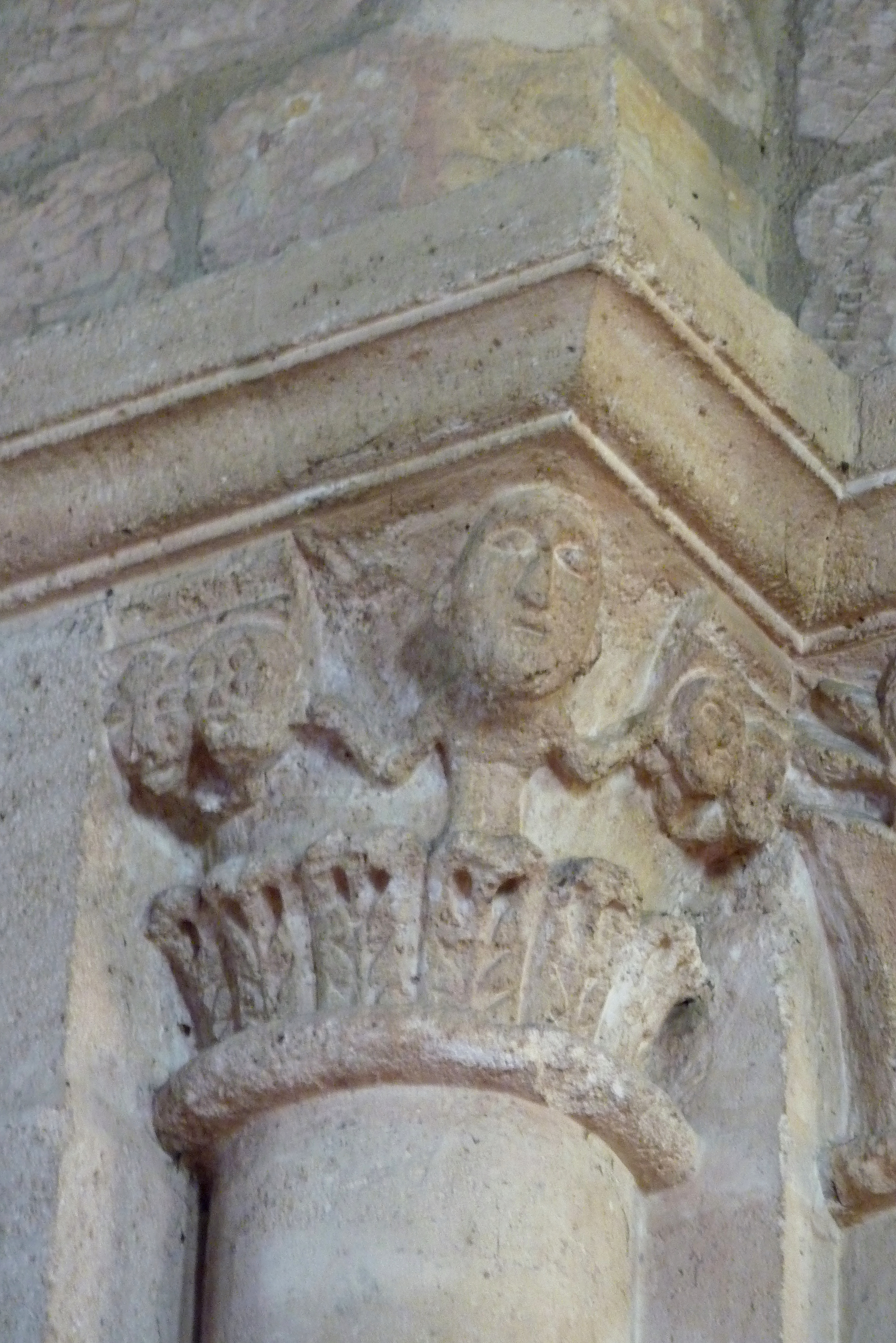 Katholische Kirche Saint-Côme-et-Saint-Damien in Luzarches, einer Gemeinde im Département Val-d'Oise (Île-de-France), romanisches Kapitell